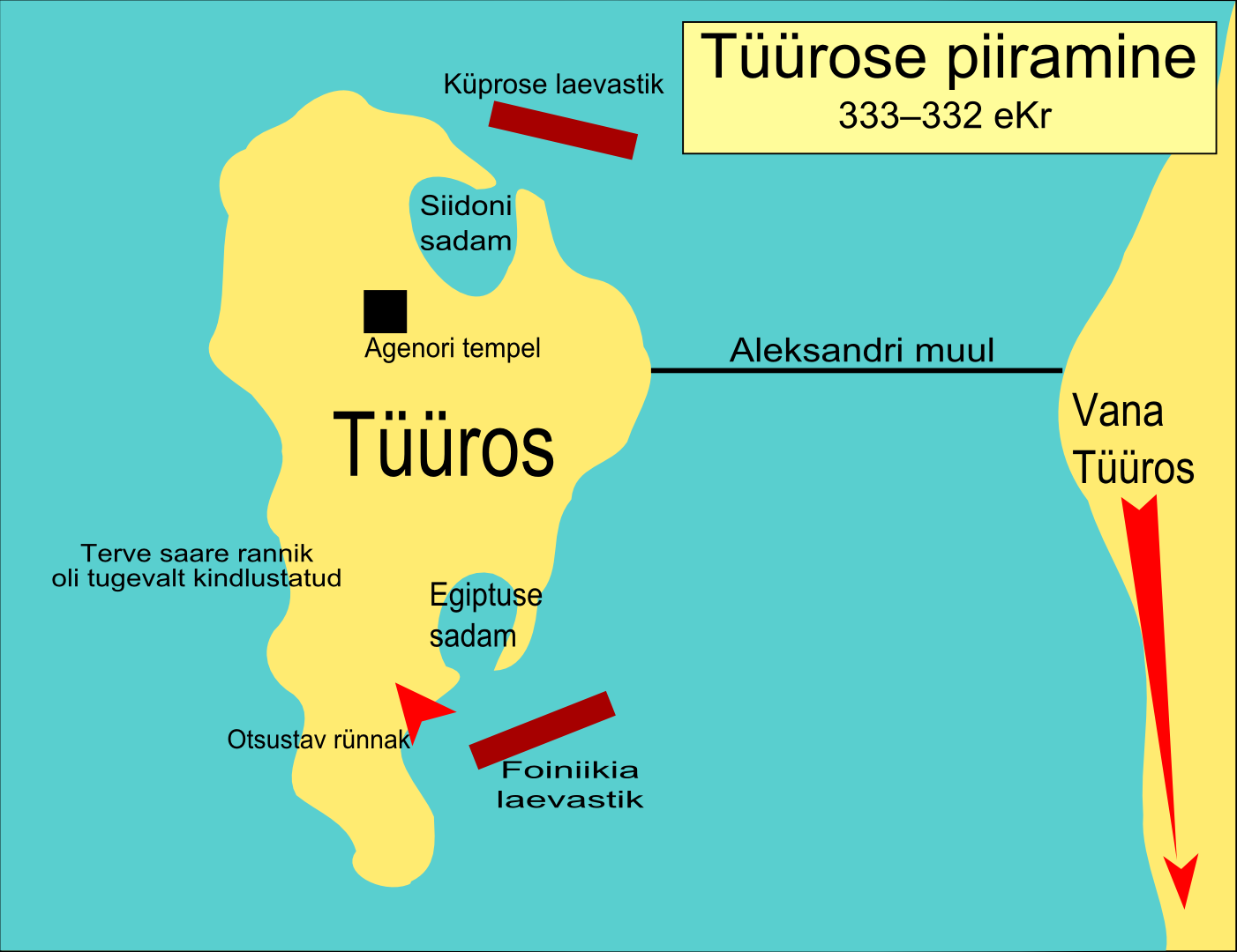 Tüürose piiramine